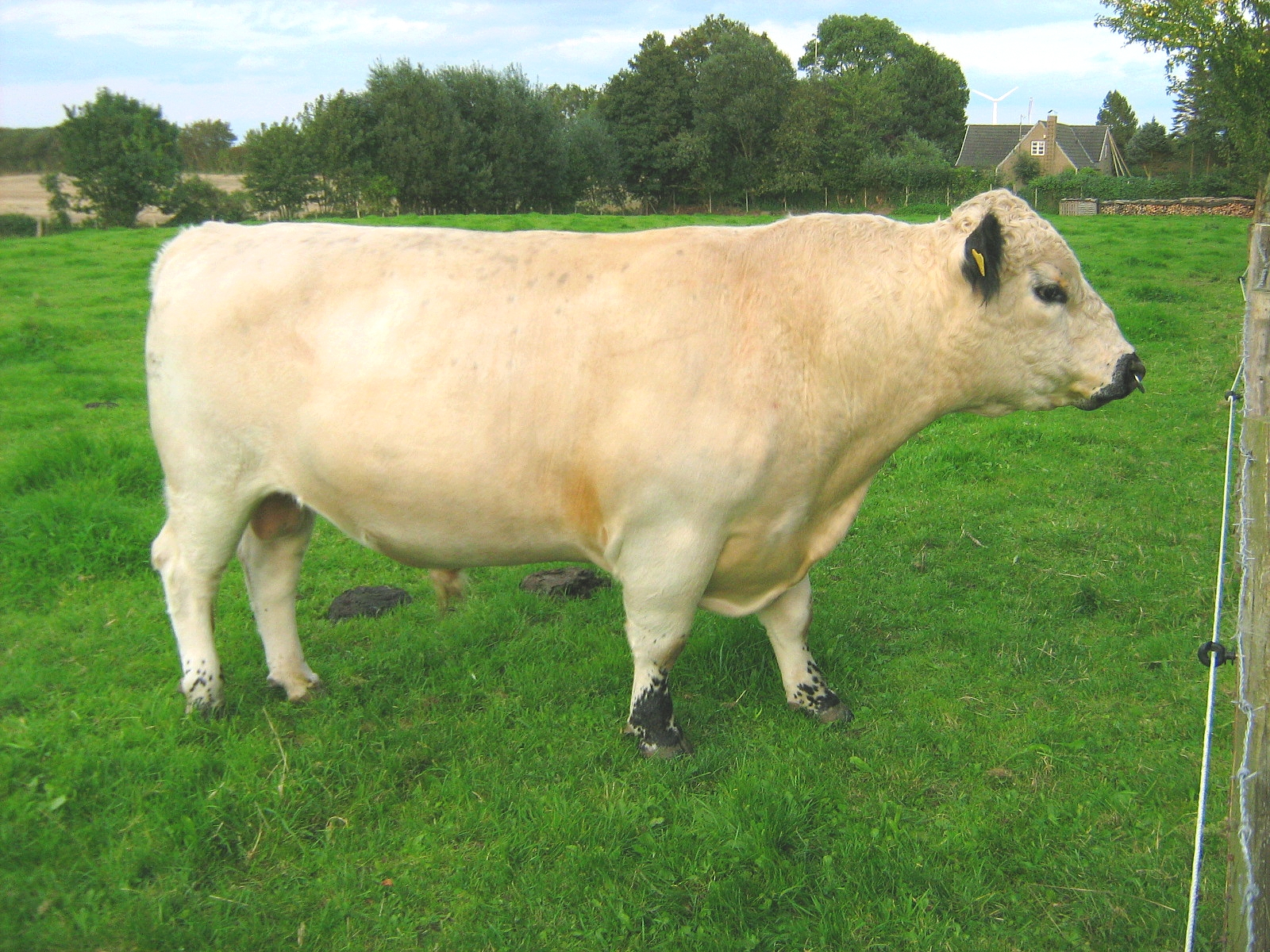 ein Gallowaybulle in Steinberg (Schleswig)